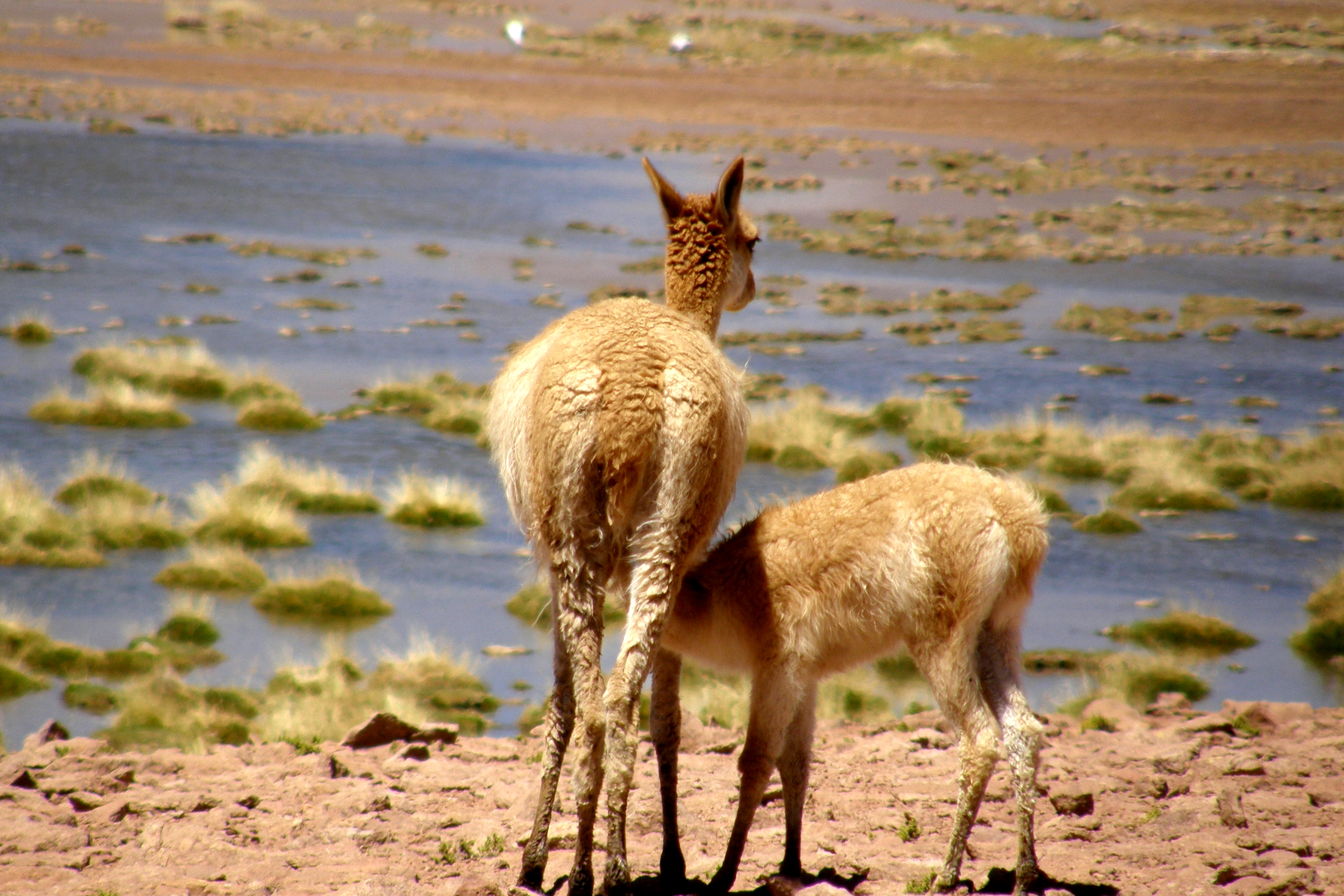 Vigogne ( Vicugna vicugna) allaitant son petit photo prise à la vega de Putana, comuna de San Pedro de Atacama, provincia d'El Loa, Región II, Chile.